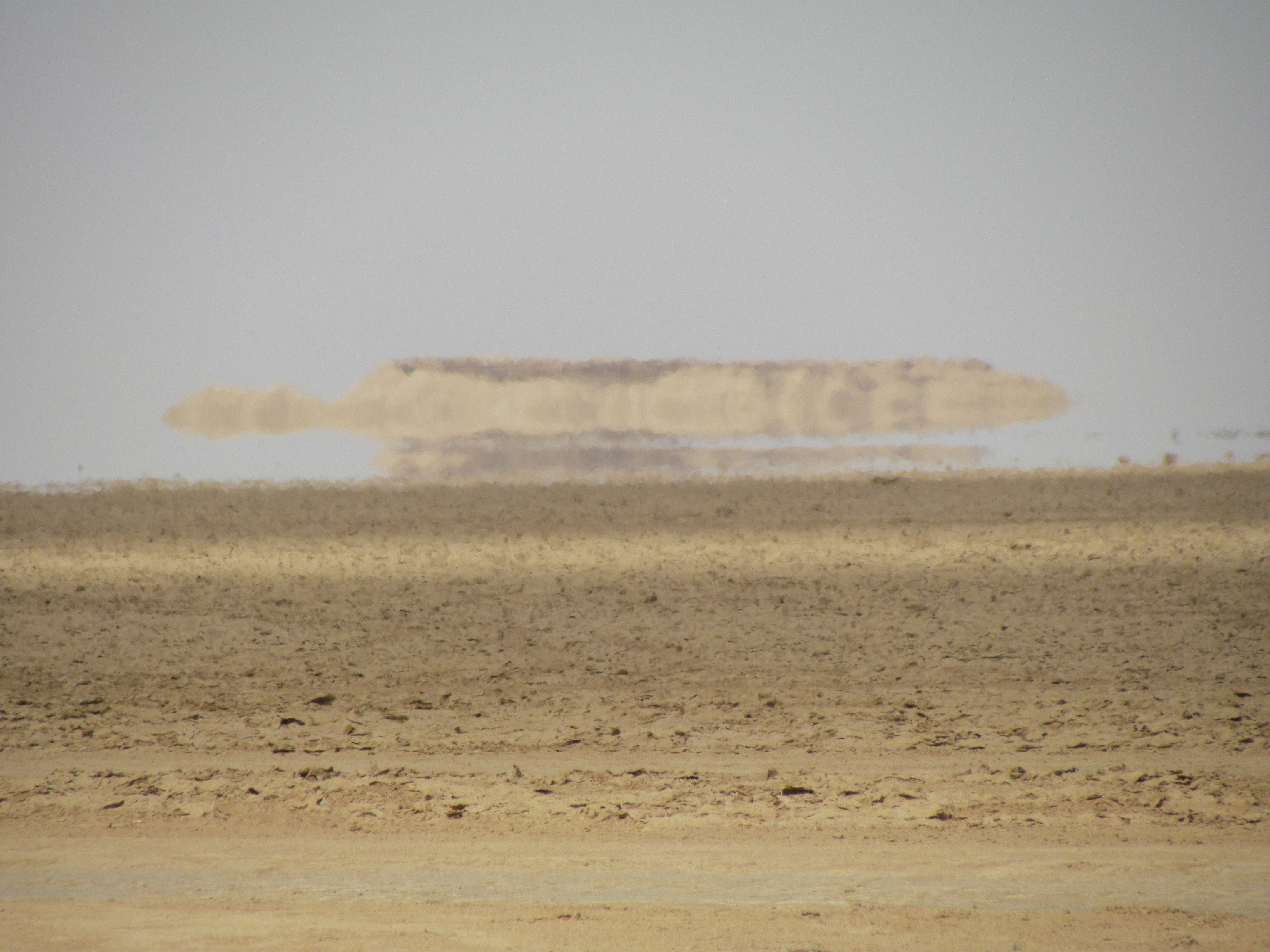 Fatamorgana v severni Sahari južno od Touzera.